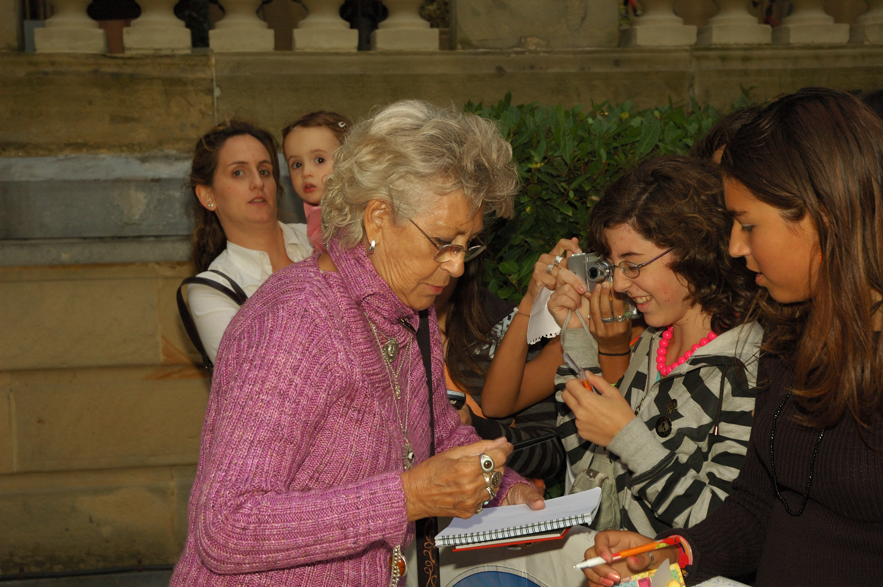 La actriz española Pilar Bardem en el Festival Internacional de Cine de San Sebastián de 2006.